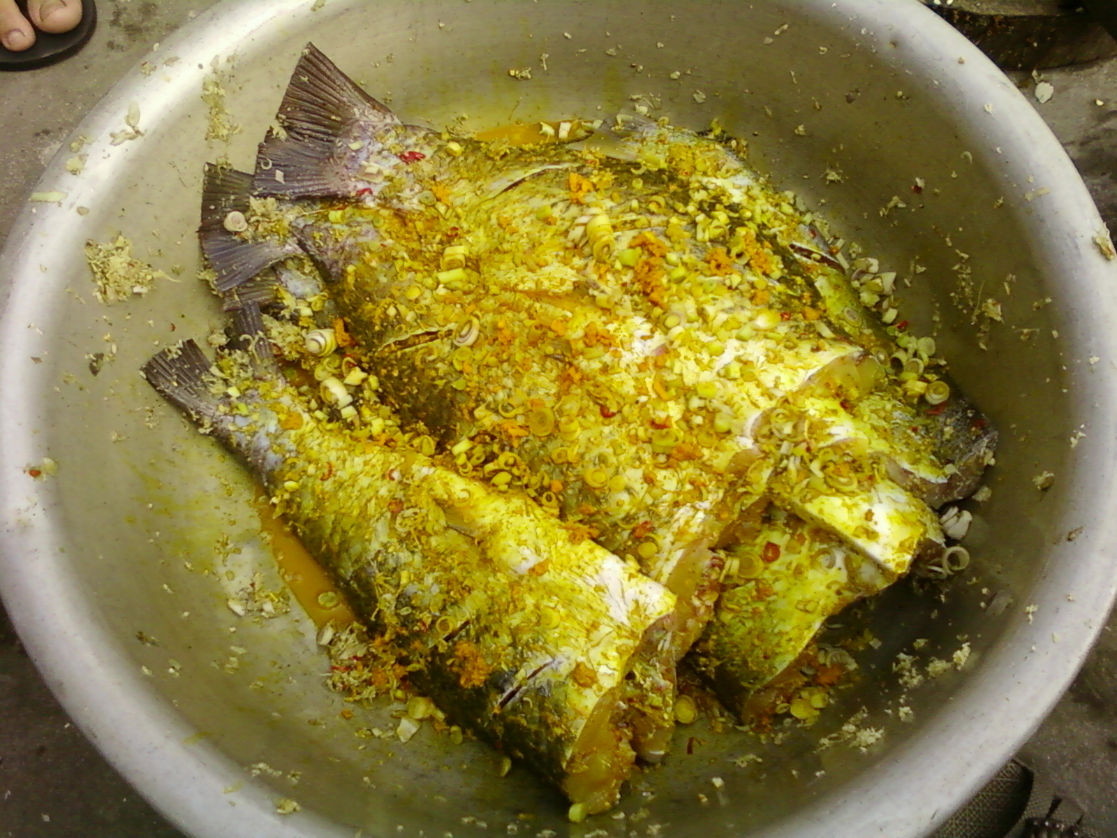 Cá nướng thái xuyên 2